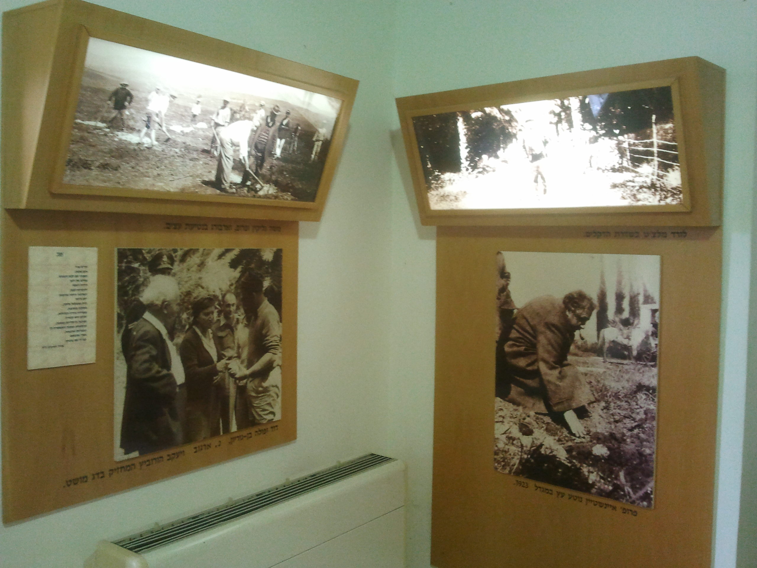 מוזיאון ובית ראשונים במגדל, הוא מוזיאון המנציח את ההיסטוריה של היישוב מאז הקמתו